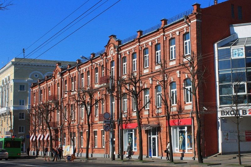 Будынак Дваранскага сходу. Магілёў